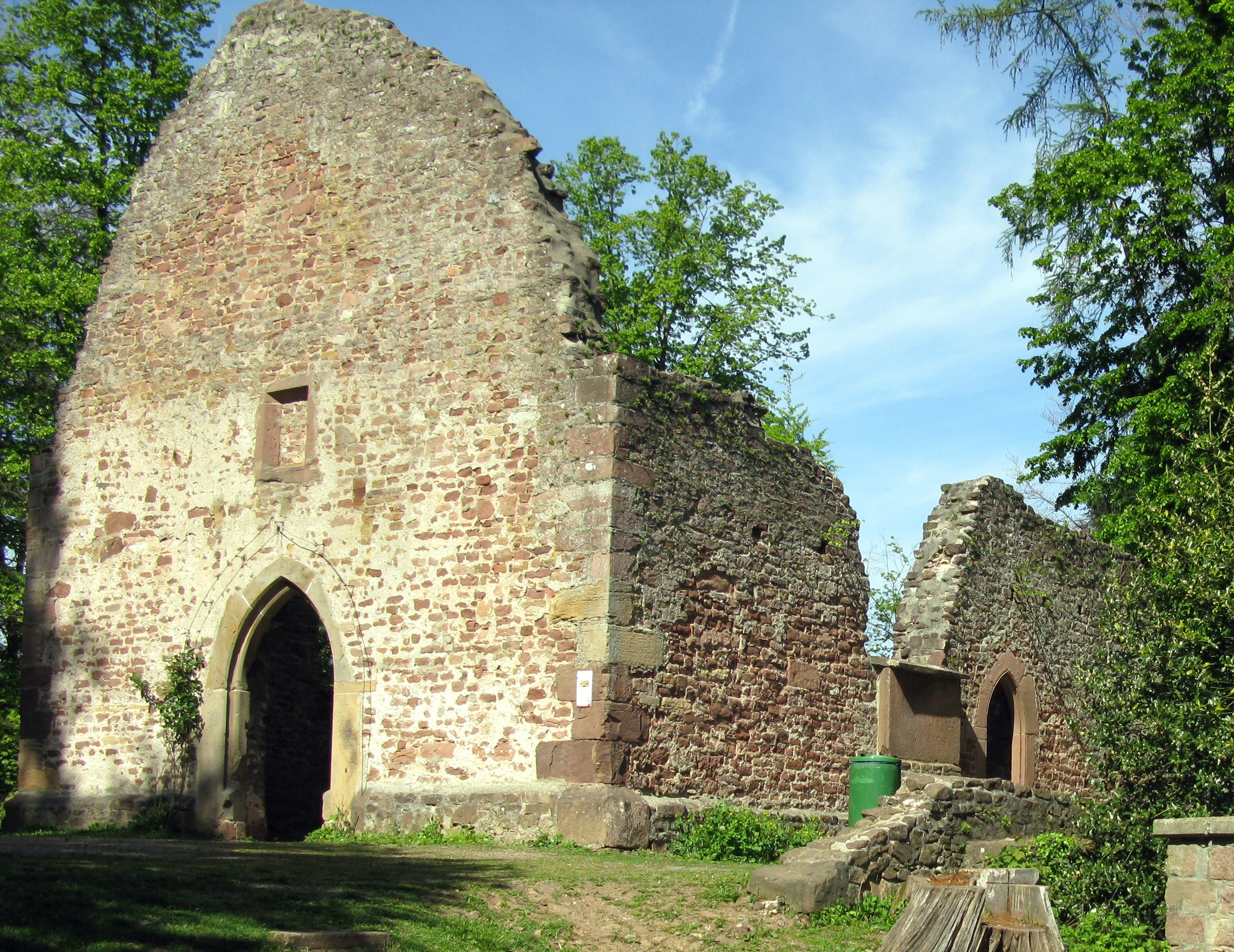 Kapelle St. Severin auf dem Mauracher Berg in Denzlingen